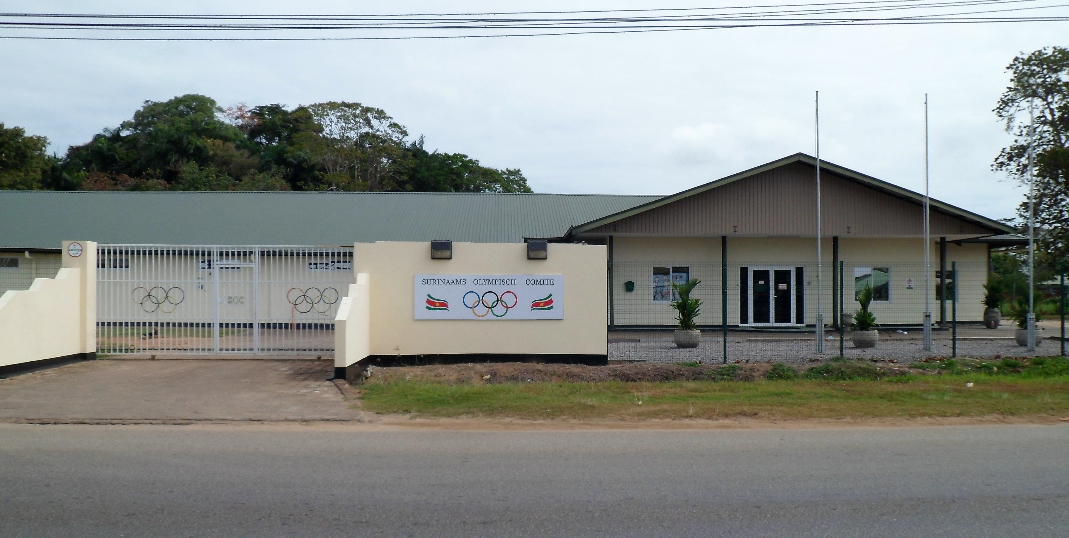 Verwaltungsgebäude des Surinaams Olympisch Comité in Paramaribo, Rattan Oemrawsinghstraat / Letitia Vriesdelaan